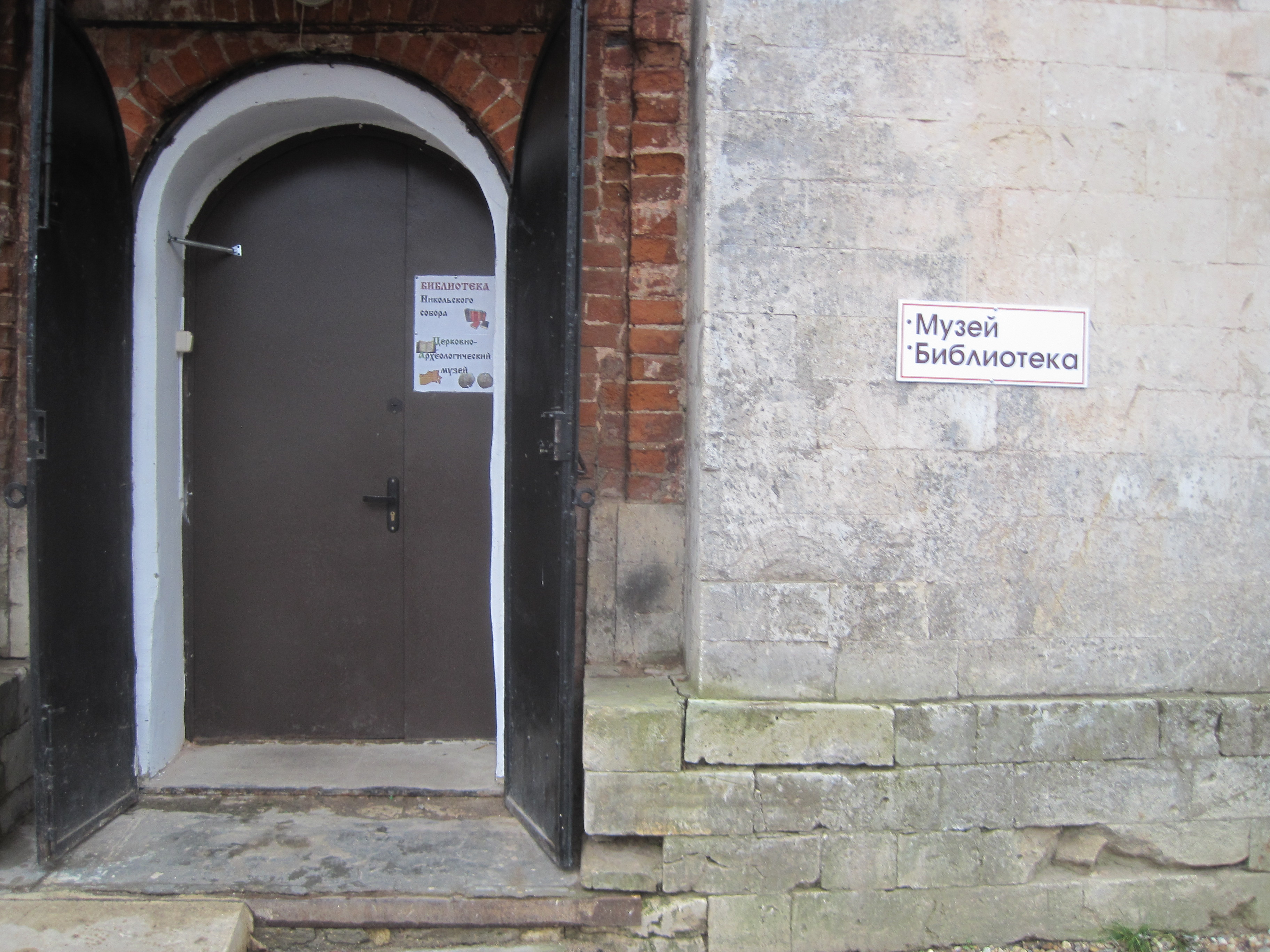 Вход в музей с северной стороны собора